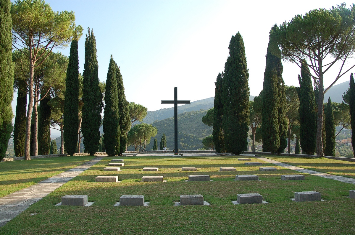 Der deutsche Soldatenfriedhof Cassino